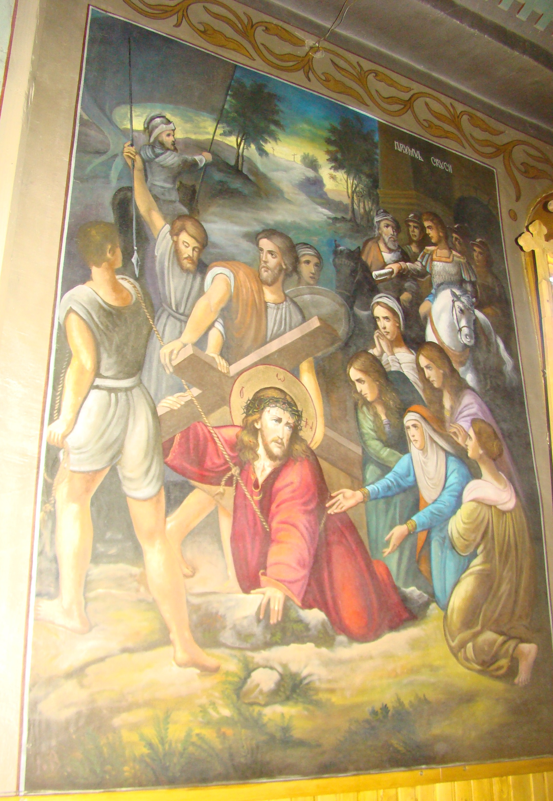 Răchițele, județul Cluj